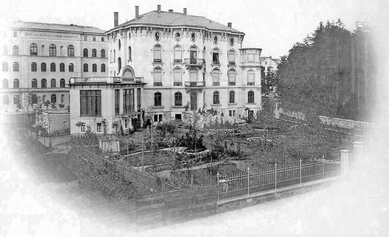 Wohnhaus mit Garten und photografischem Atelier von Berta Wehnert-Beckmann, Leipzig, Elsterstraße 38.Im Hintergrund ist die 2. Bezirksschule in der Lessingstraße 23–27 zu sehen.